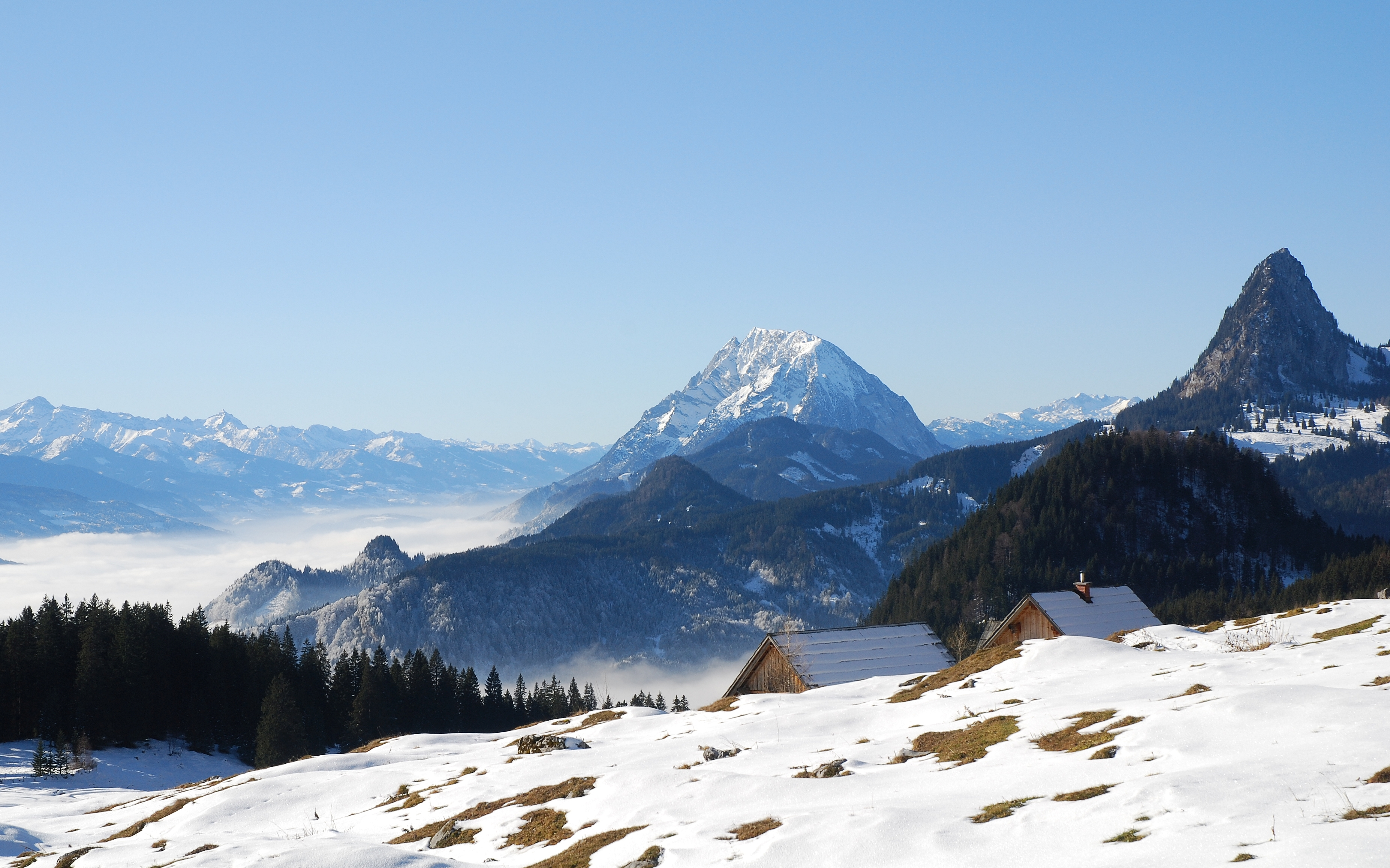 Blick von der Hinteregger Alm, Totes Gebirge zum Grimming im Ennstal